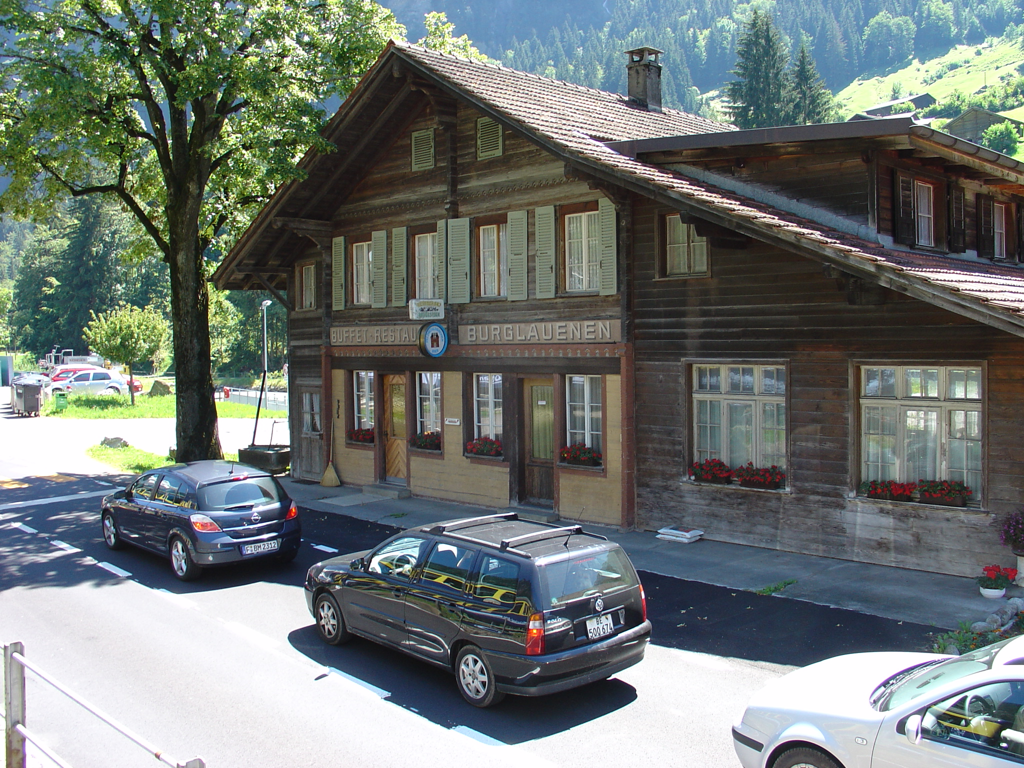 Berner Oberland-Bahn Burglauenen Station